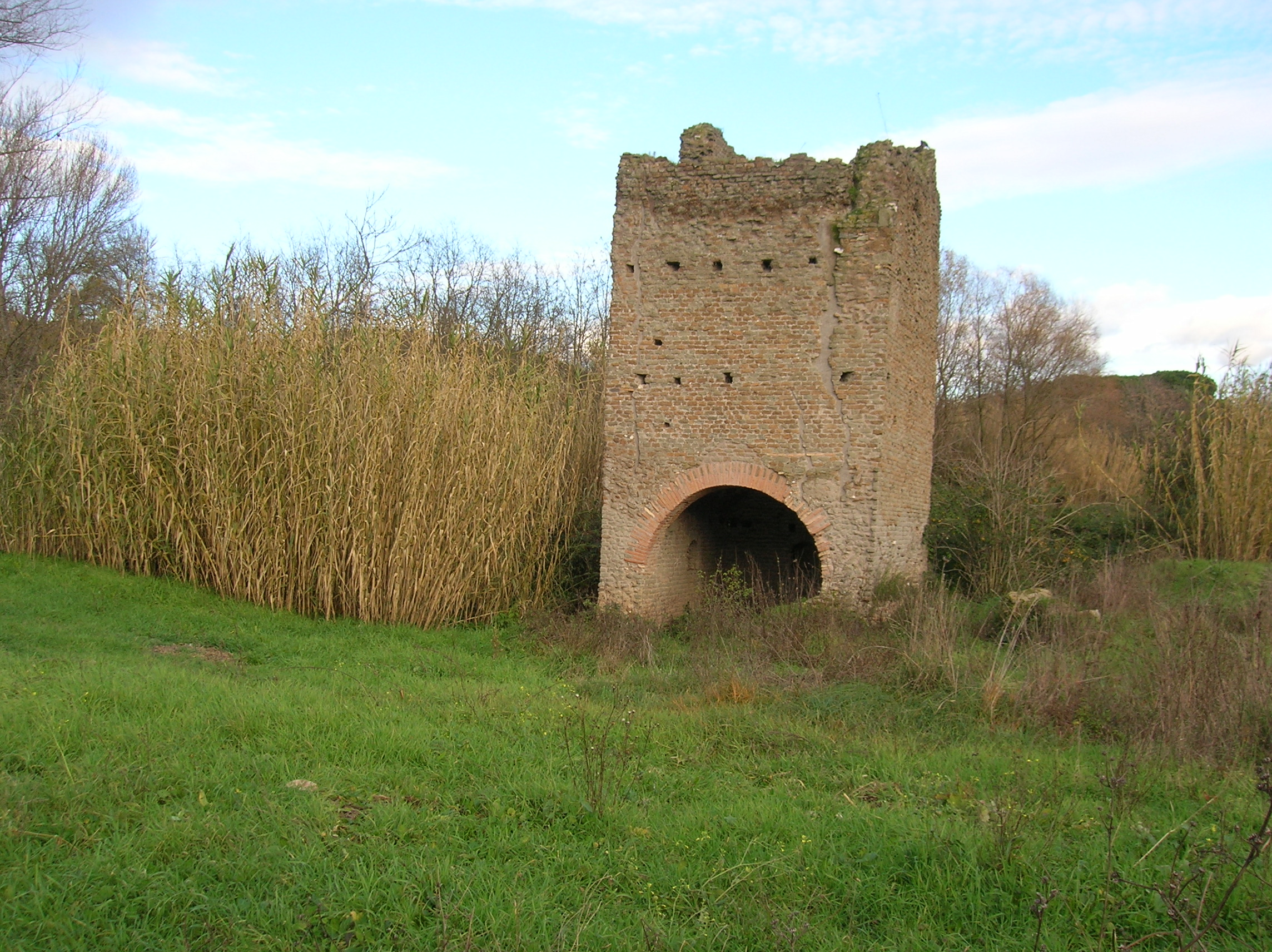 Torre Valca nel Parco della Caffarella, Roma, Italia